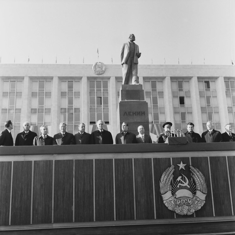 Chisinau.